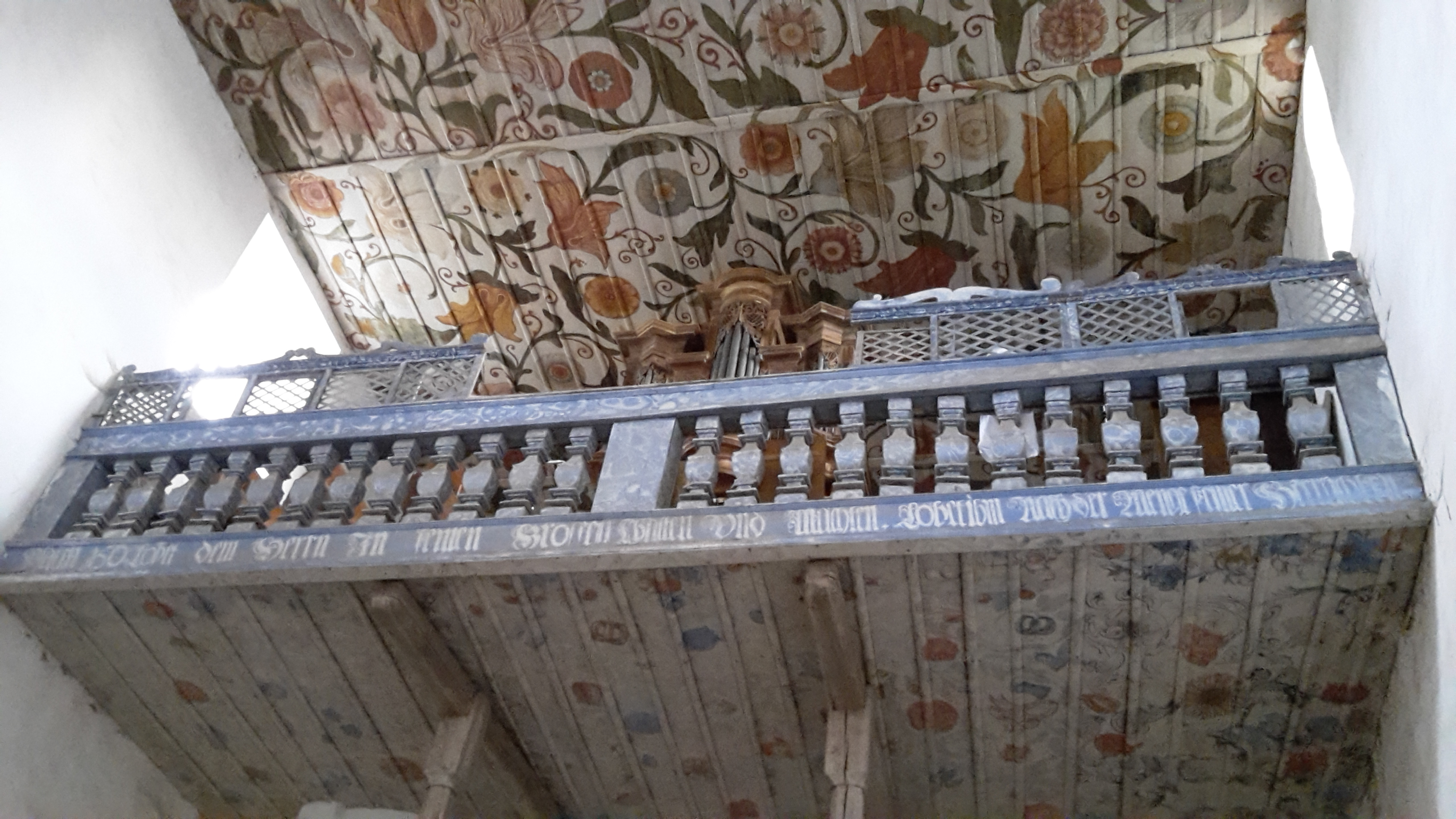 Malovaný strop a kruchta v kostele sv. Mikuláše v Kašperských Horách, malba z roku 1700.